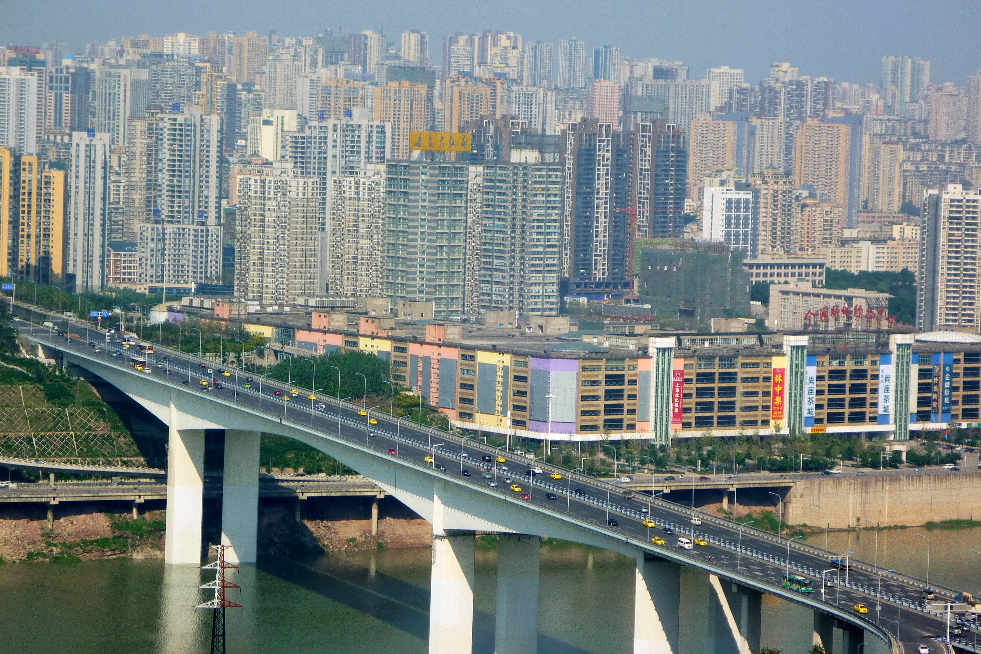 重庆江北